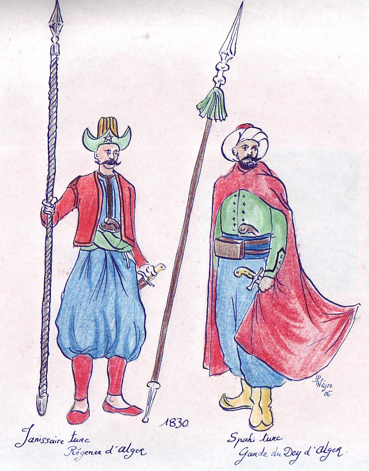 dessin personnel de Jp.negre